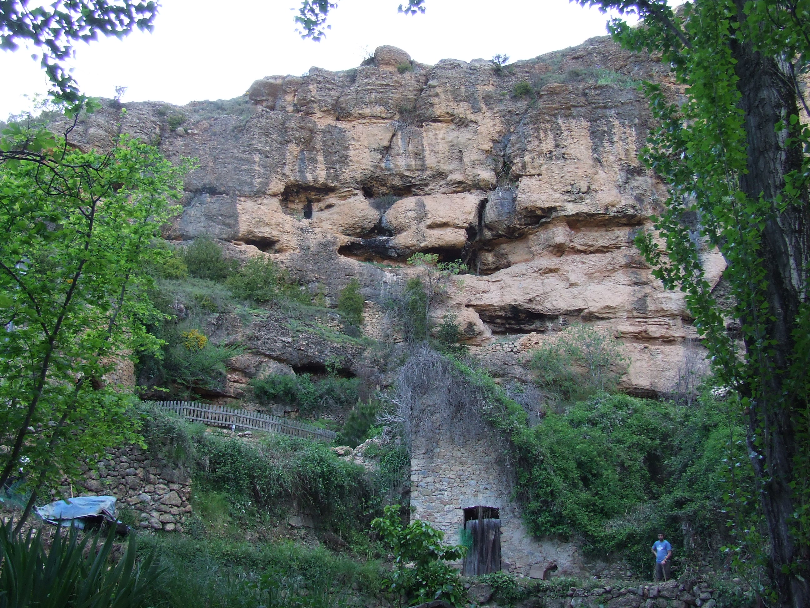 La paret de roca que envolta el poble de Rivert (Toralla i Serradell, Conca de Dalt, Pallars Jussà)